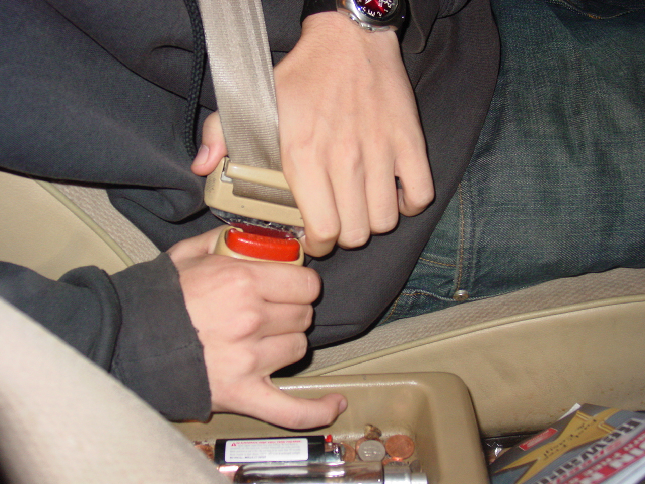 CU, man buckling seatbelt